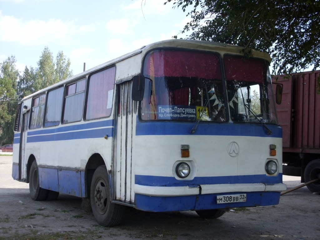 Автобус маршрута Папсуевка-Почеп